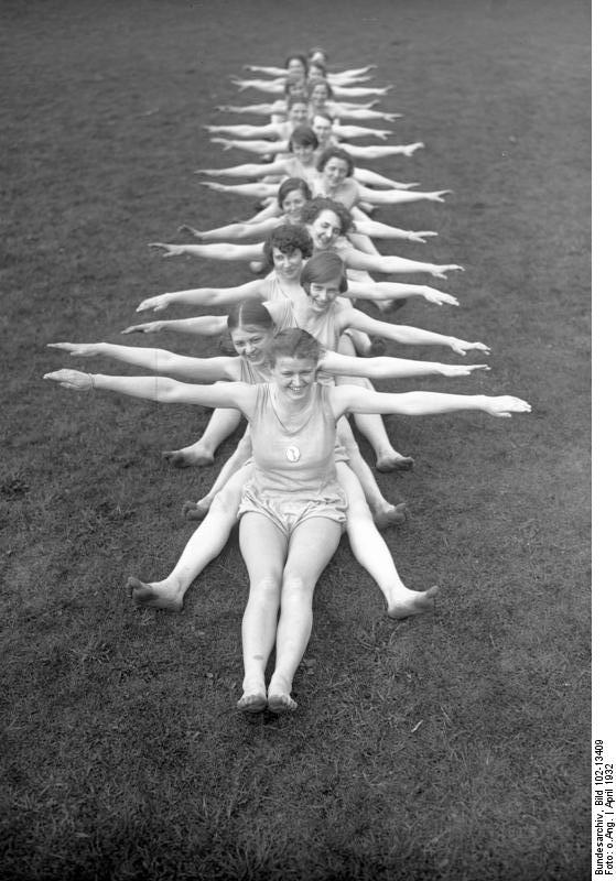 Der lebende Budha ! Junge Mädchen der bekannten deutschen Frauenturnschule Logis in Hannover beim Morgentraining.